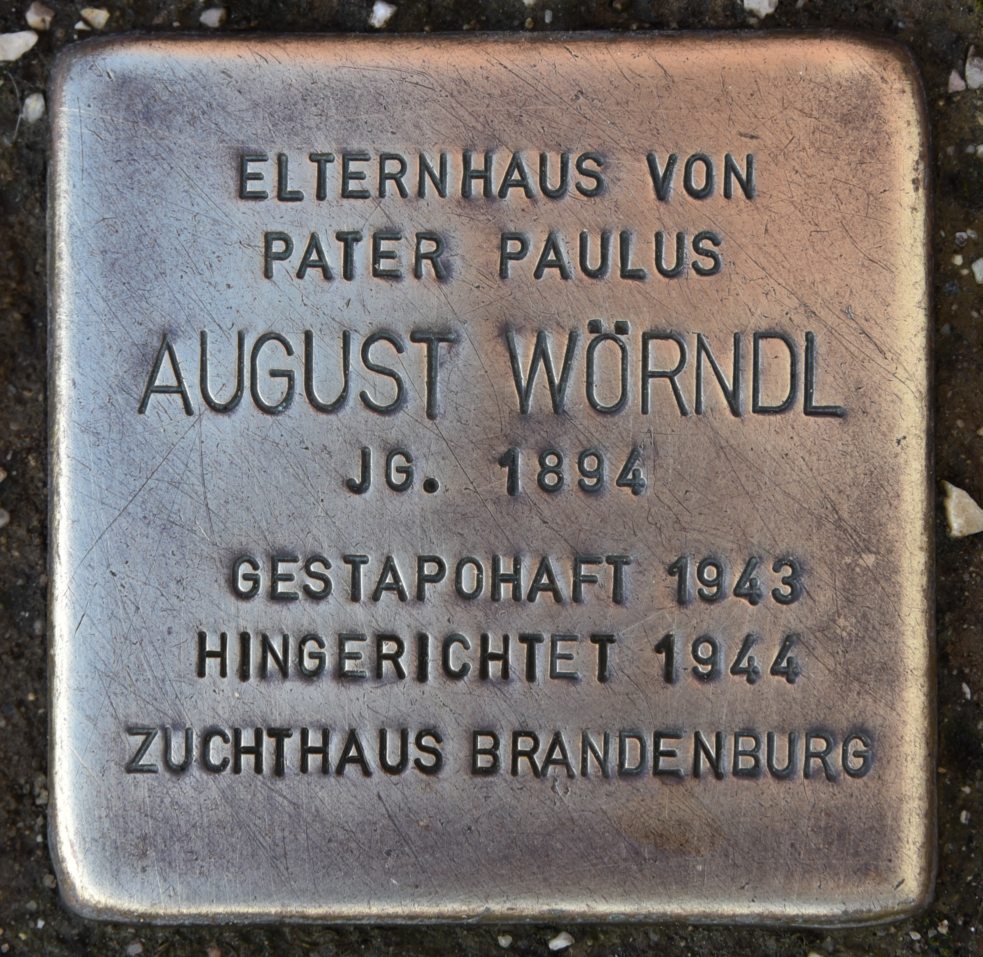 Stolperstein für Pater Paulus (August) Wörndl.